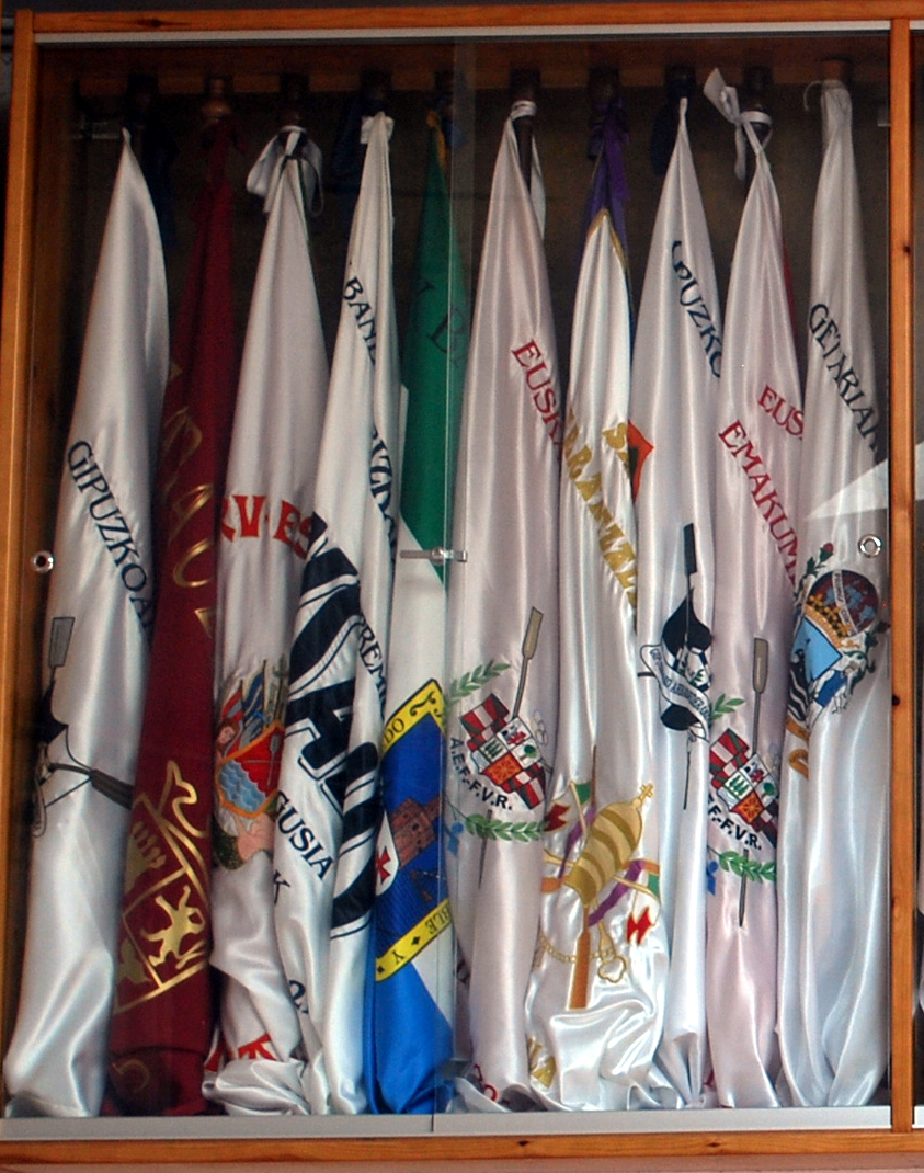 Drapeaux gagnés par Zumaia (Guipuscoa)